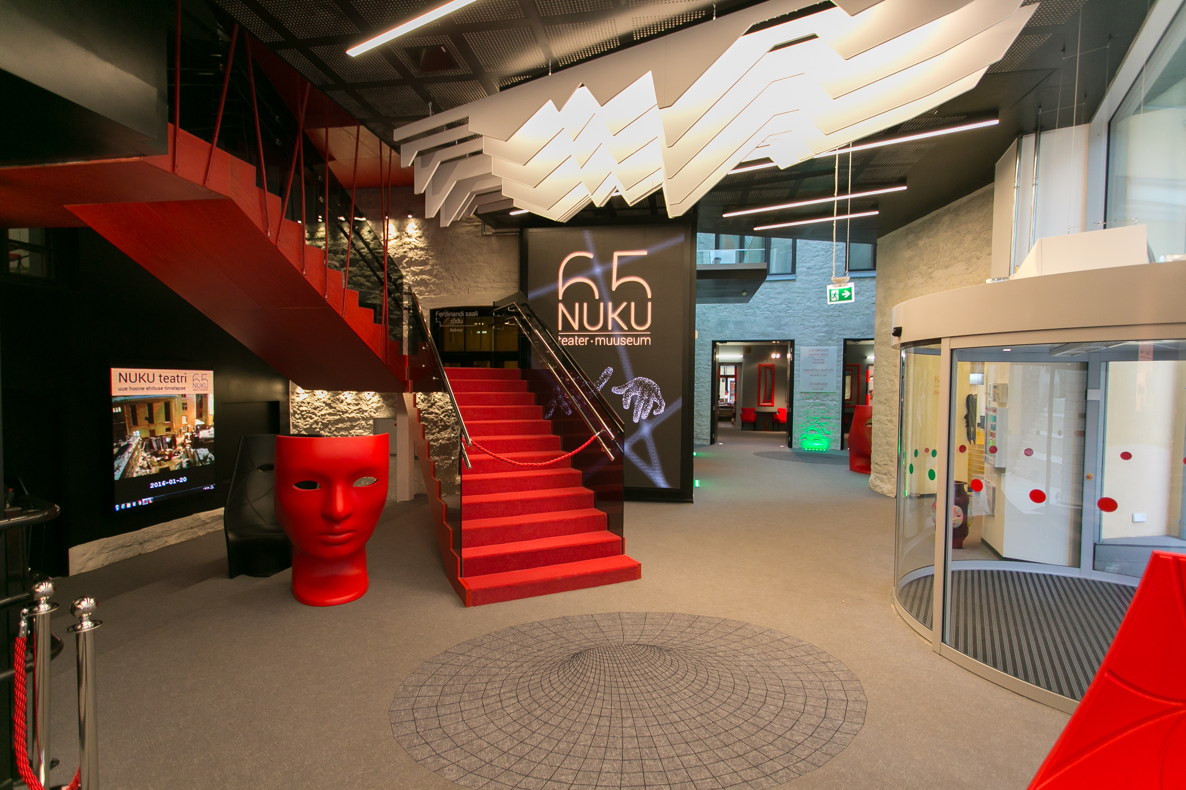 Teatri peafuajee